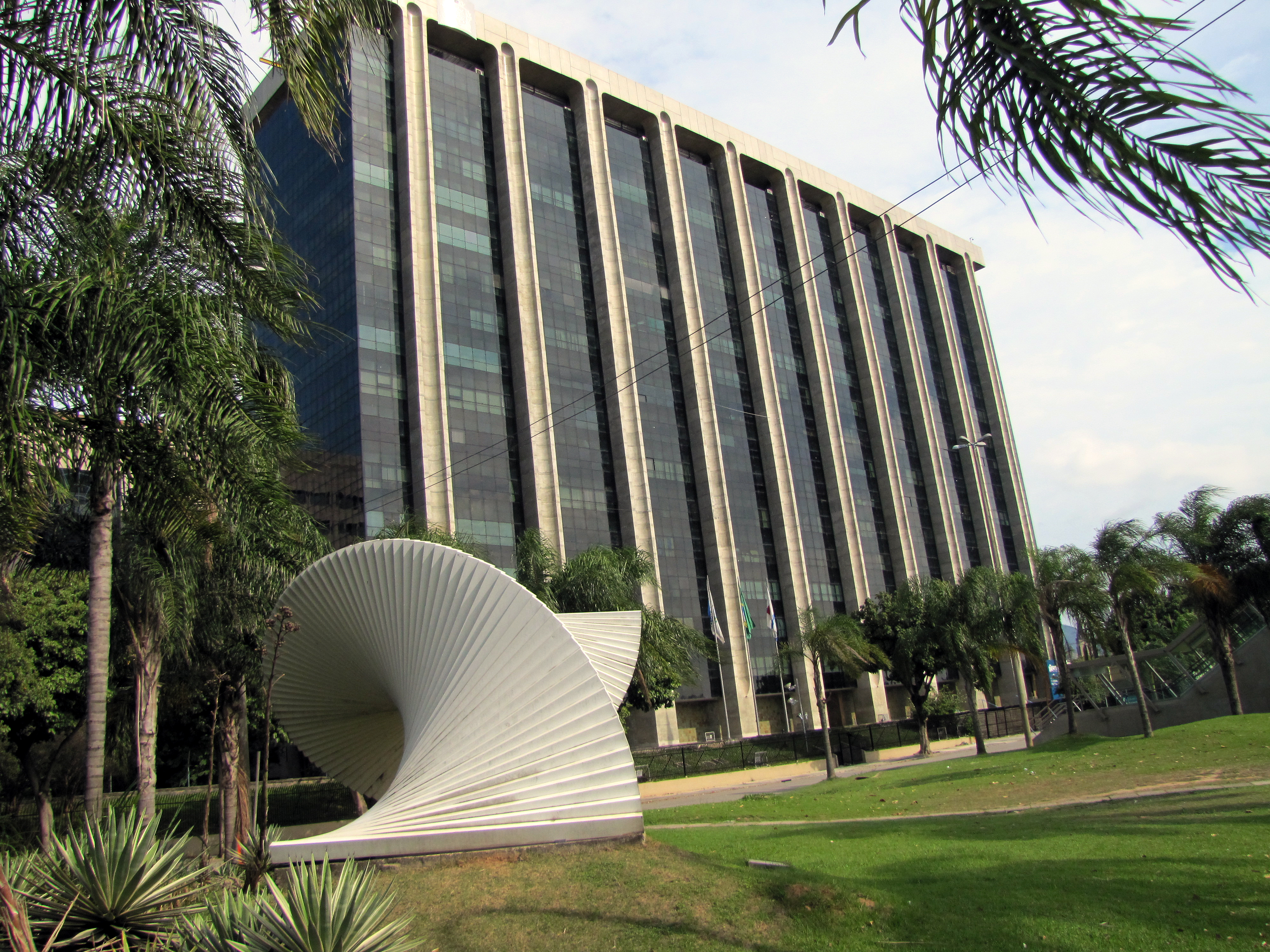 Predio da Prefeitura do Rio de Janeiro. Cidade Nova.